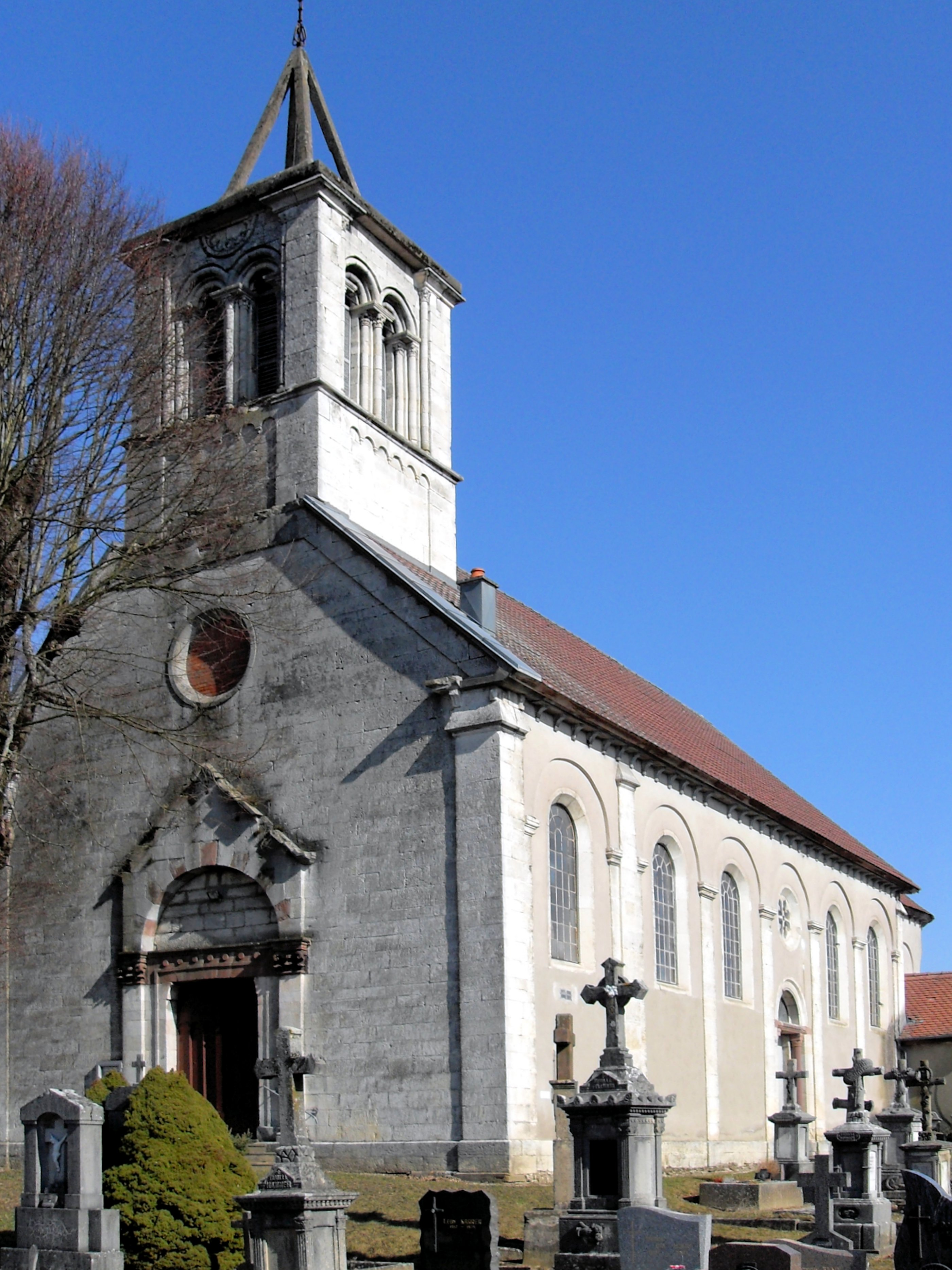 L'église de la Nativité-de-Notre-Dame à Petit-Croix